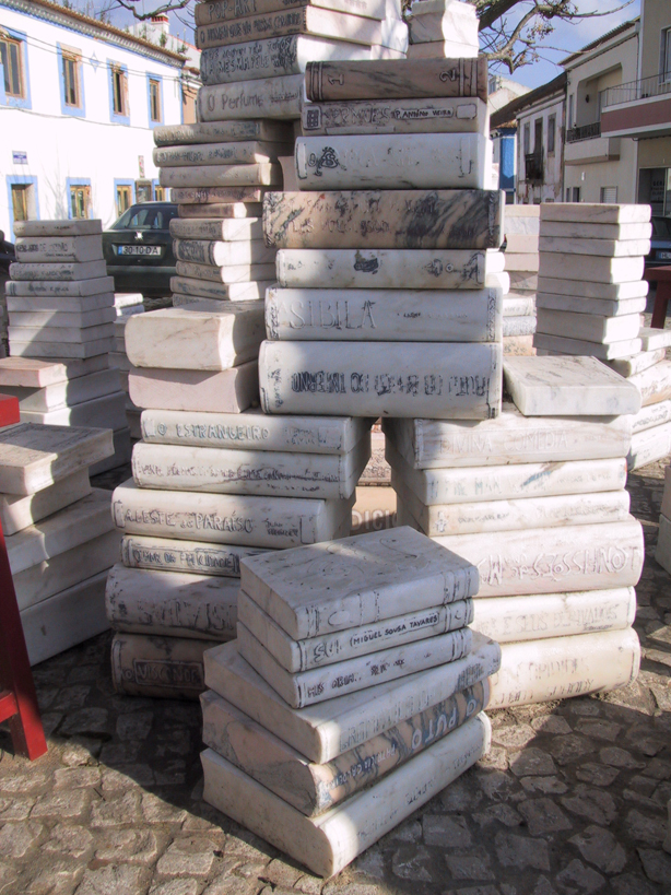 Melides Portugal